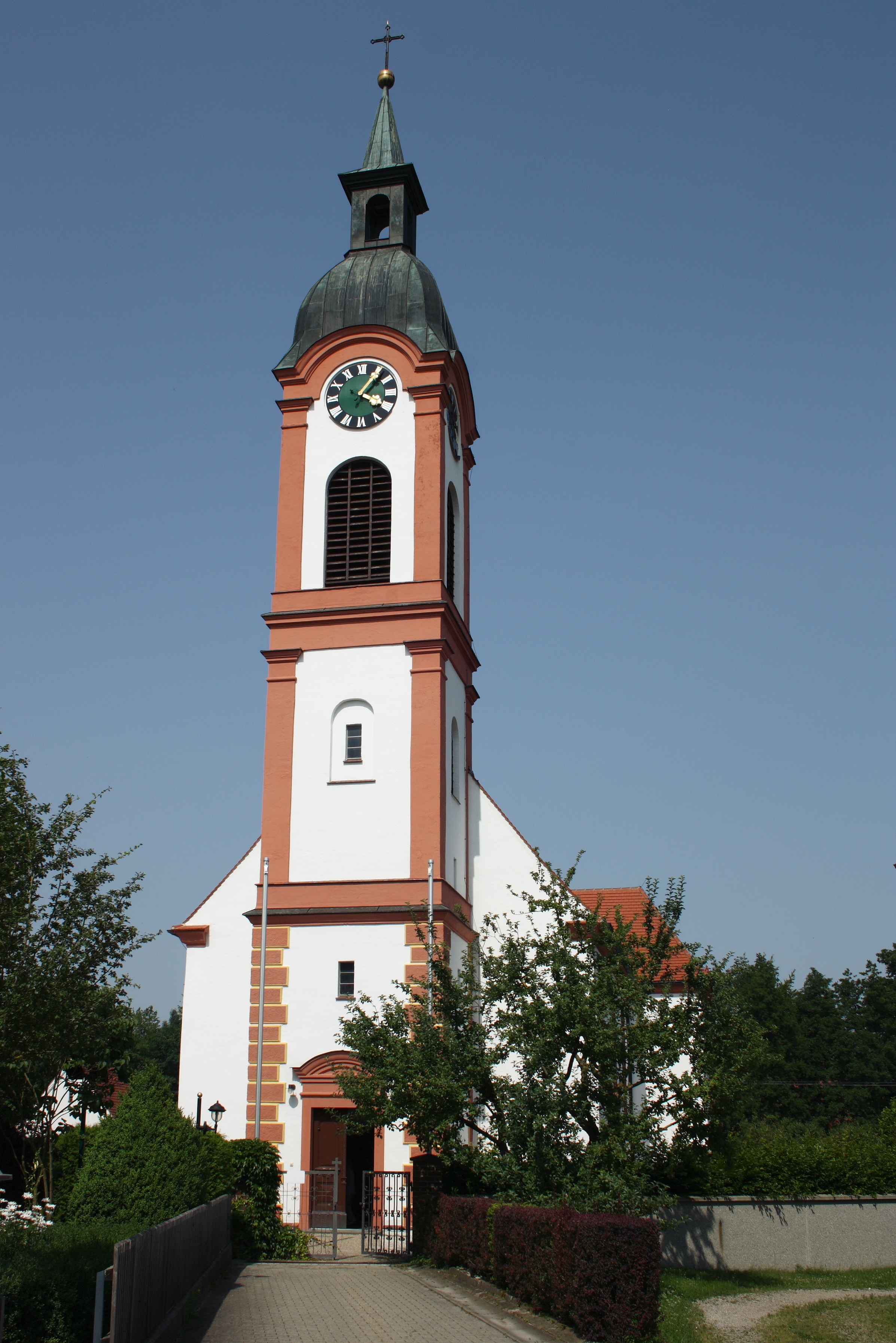 Katholische Pfarrkirche St. Stephan in Autenried, einem Ortsteil von Ichenhausen im Landkreis Günzburg (Bayern), 1708/09 Neubau durch Johann Georg Reiner, 1765/66 Umgestaltung durch Joseph Dossenberger d.J., neubrocker Turm mit welscher Haube, Laterne und Spitzhelm, von 1890